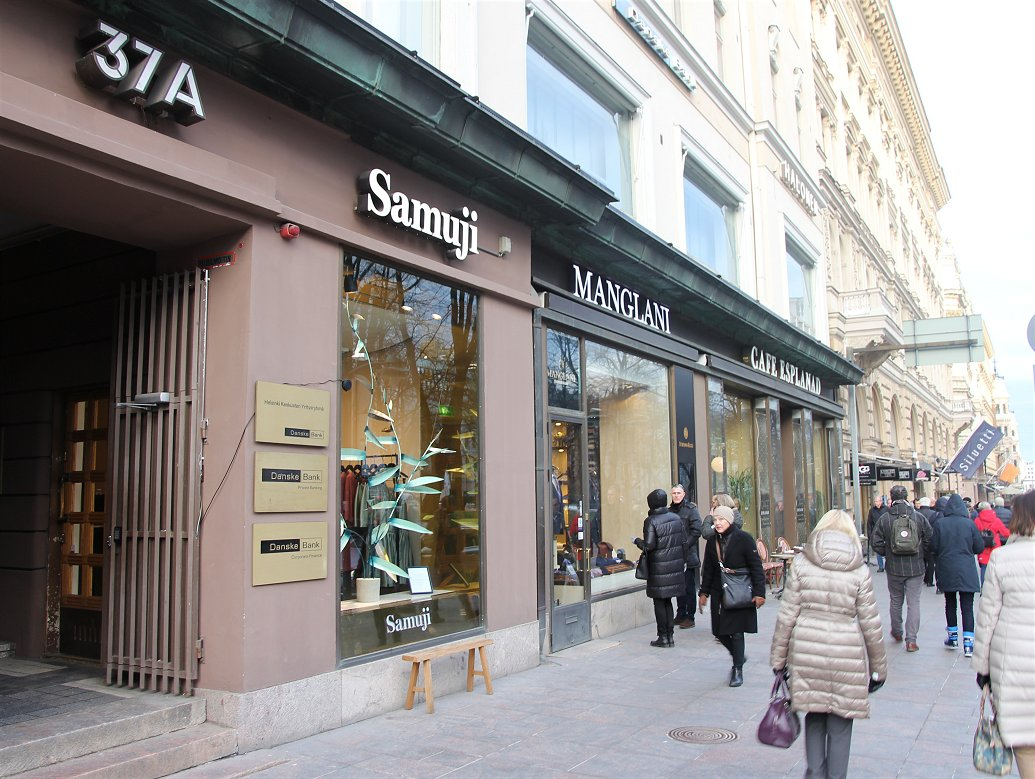 Samujin myymälä Pohjoisesplanadilla Helsingin Kluuvissa. Samuji on suomalaisen vaatesuunnittelija Samu-Jussi Kosken suunnittelutalo, tuotemerkki ja vaatekauppa.